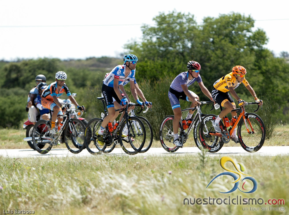 1a Etapa Villa Mercedes Lunes 20 de enero de 2014 San Luis - Villa Mercedes (166,2Km)